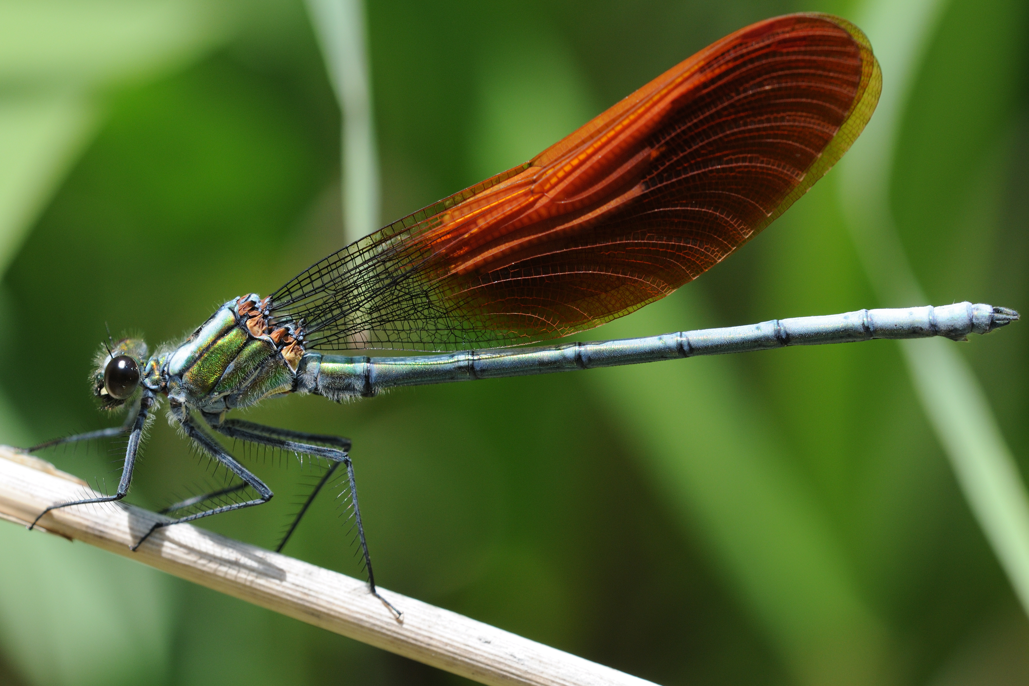 ニホンカワトンボ雄 広島県